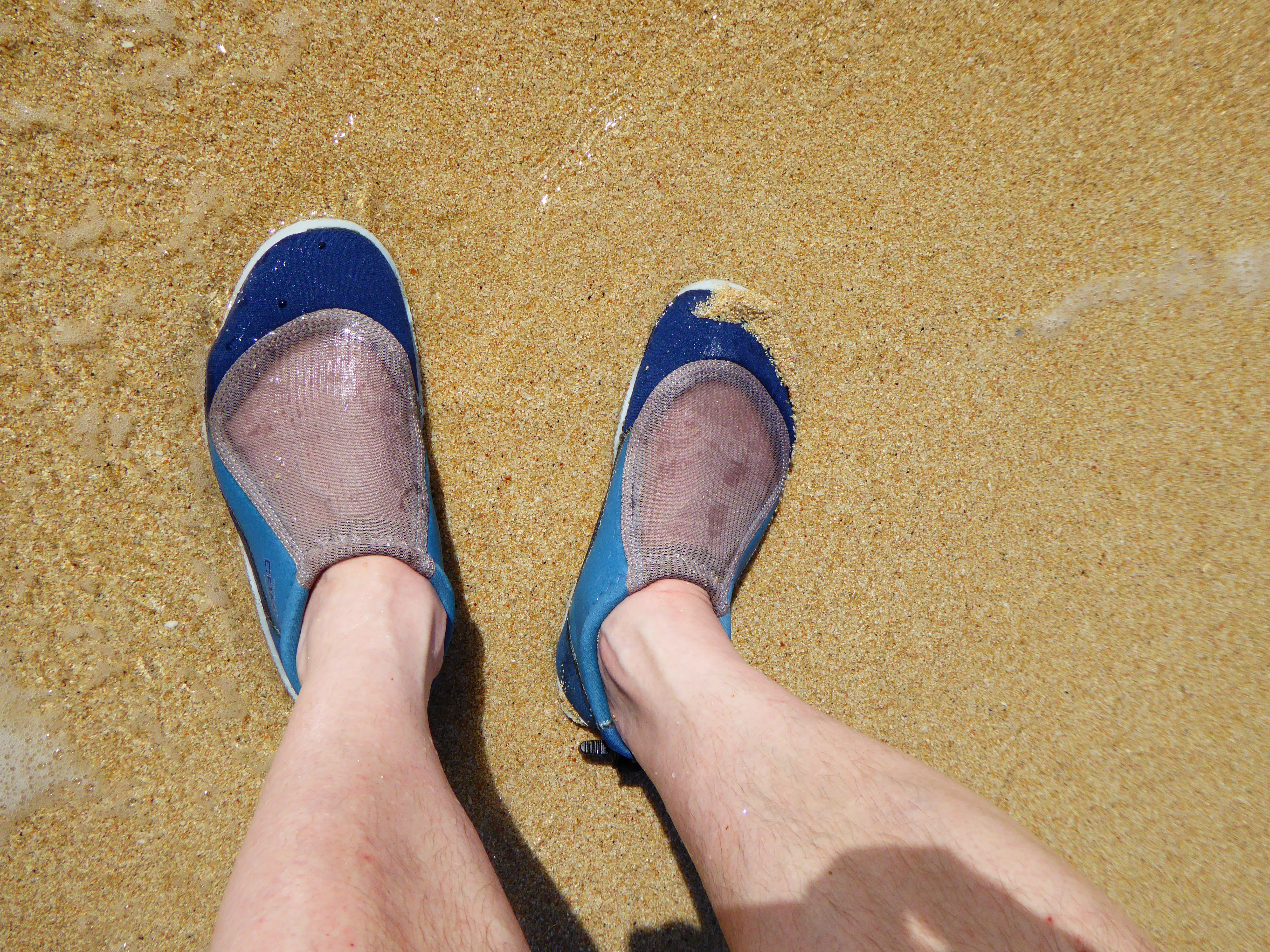 Badeschuhe